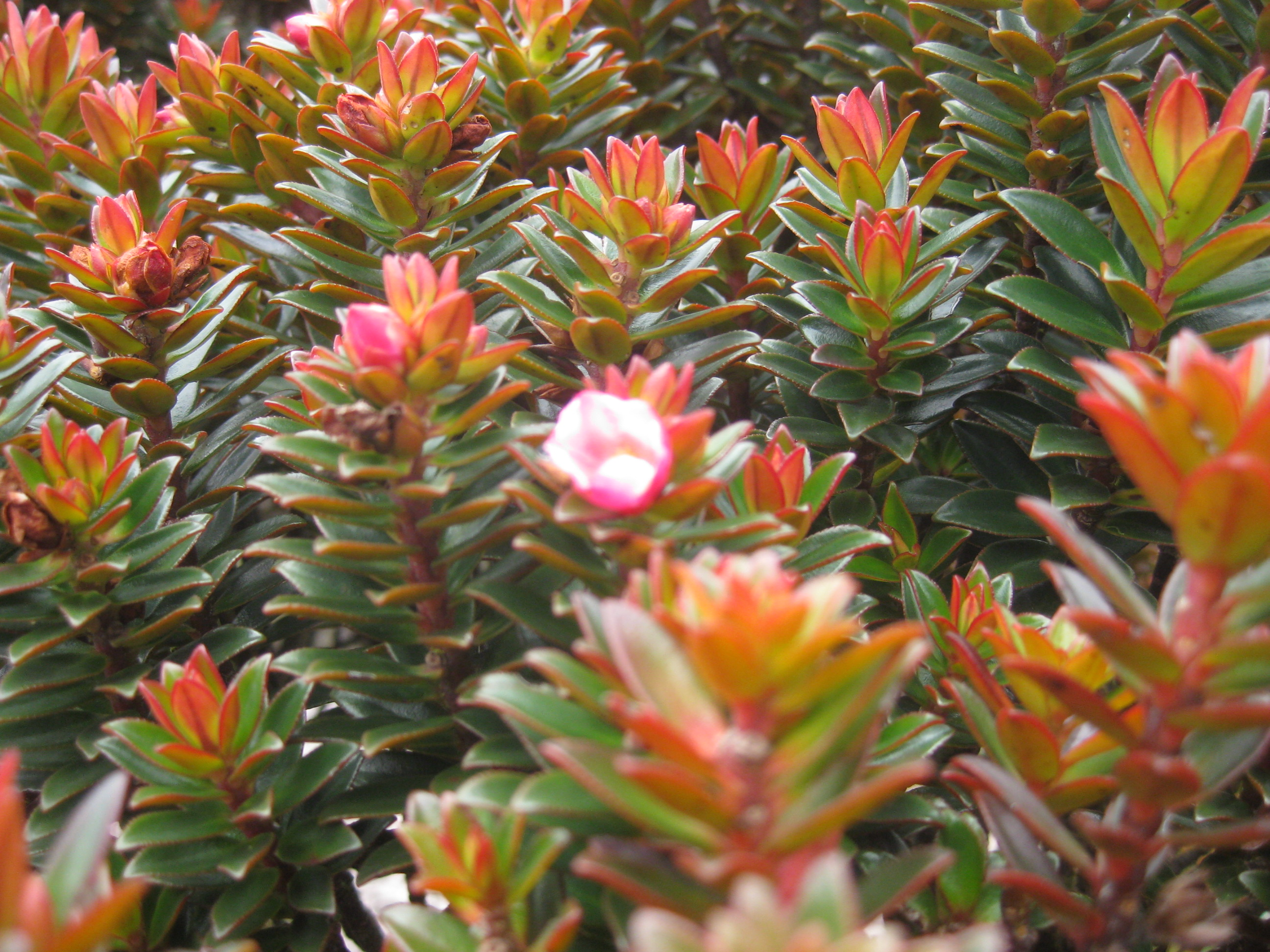 Mount Roraima, Venezuela